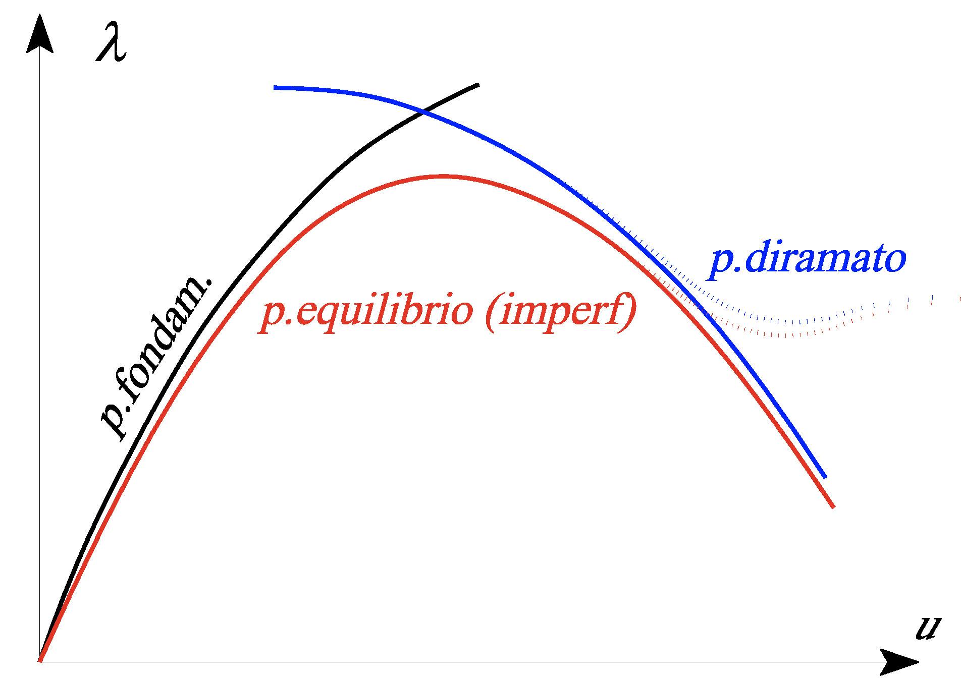 Ricostruzione equilibrio percorso equilibrio struttura imperfetta